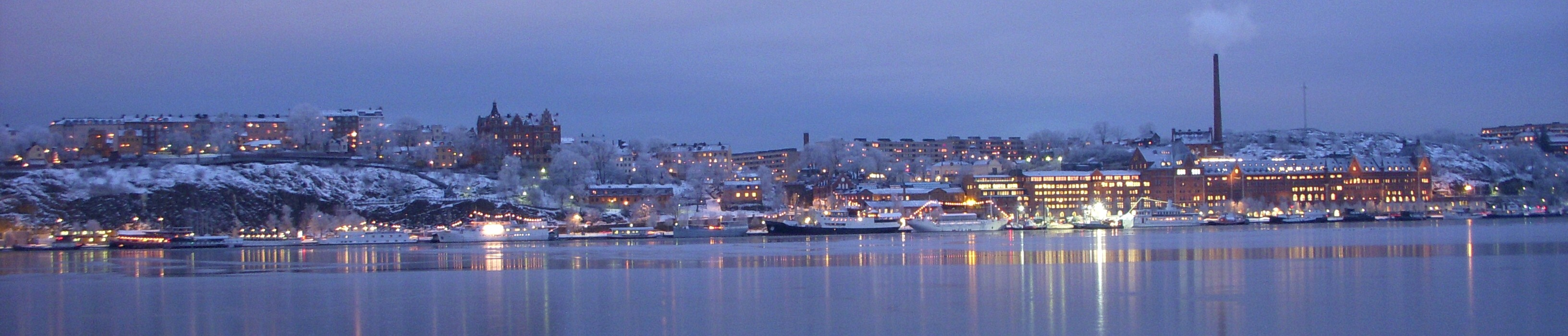 Söder Mälarstrand från Centralbron, Stockholm